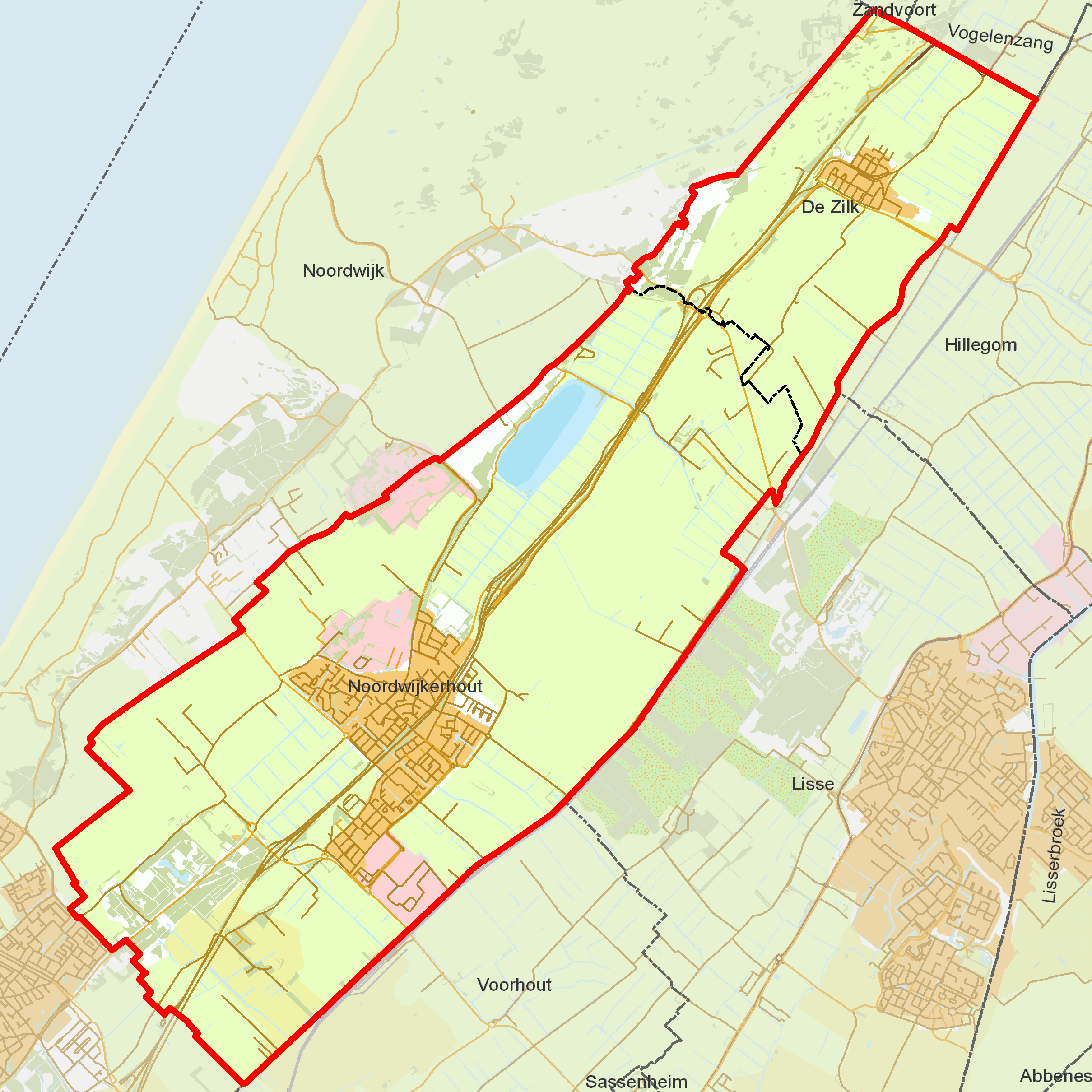 BAG woonplaatsen - Gemeente Noordwijkerhout.png